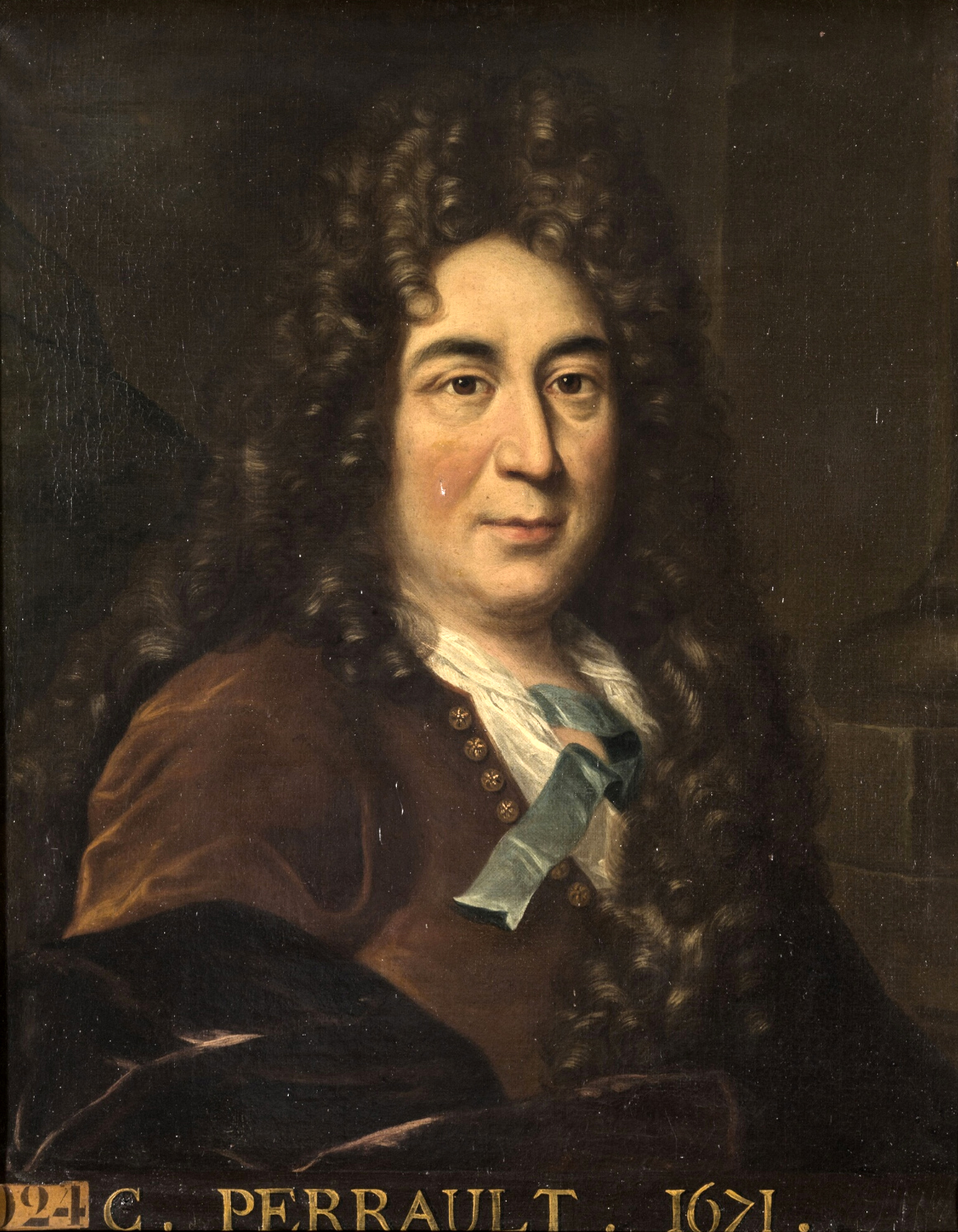 Contrôleur général des Bâtiments du roi, membre de l'Académie française